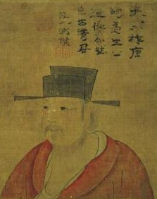 陸贄（754年－805年），字敬輿。吳郡嘉興（今浙江嘉興人），原籍吳郡吳縣（今蘇州），唐代政治家、文學家、醫學家